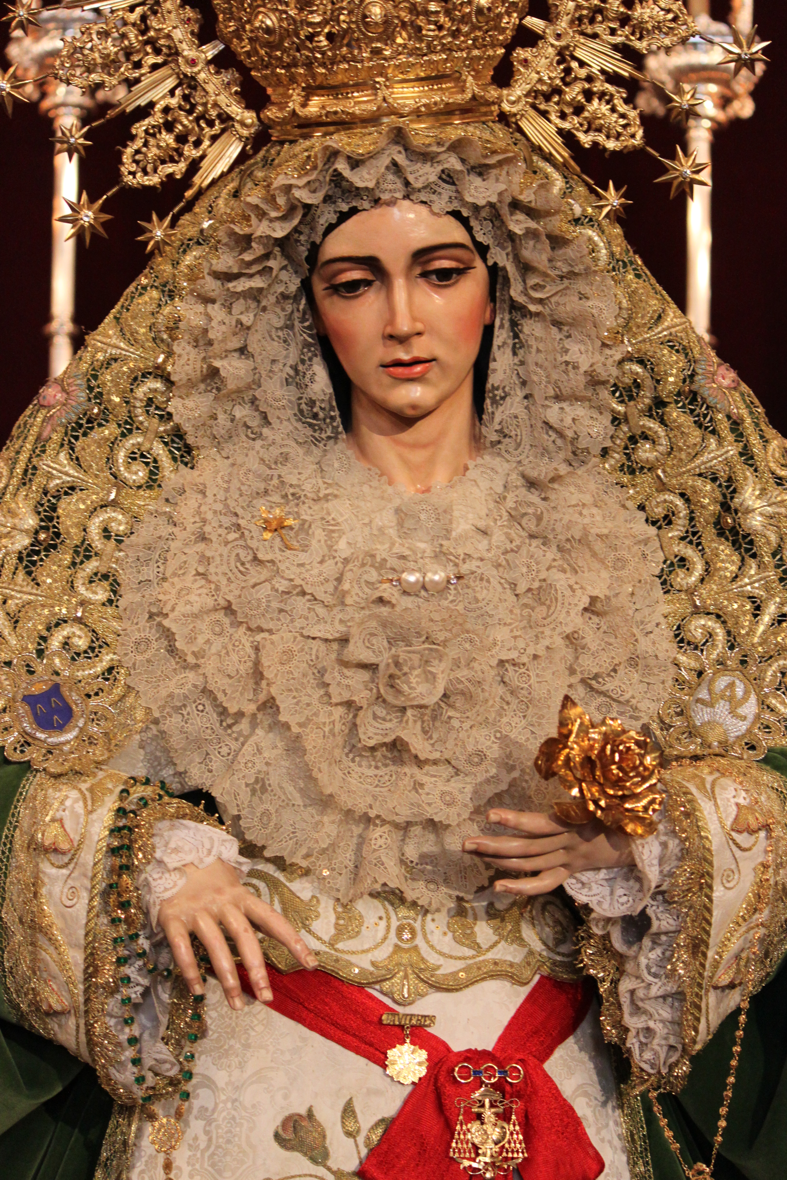 Imagen titular de la Hermandad de la Resurrección de Sevilla.